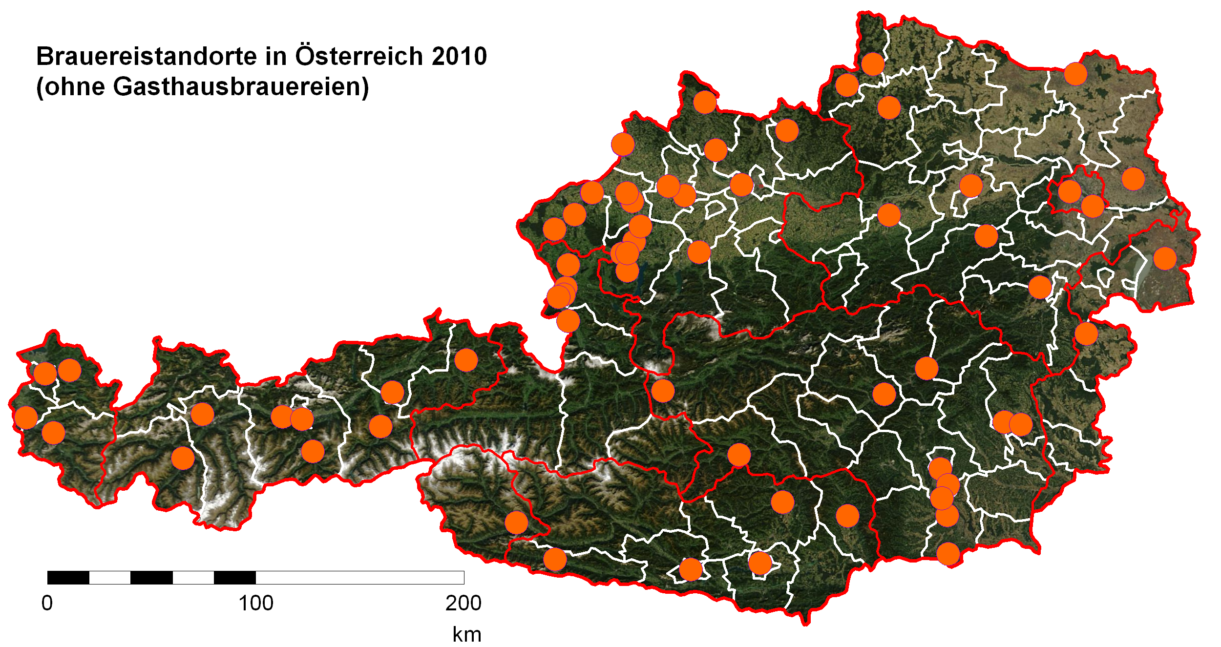 Brauereistandorte in Österreich 2010 (ohne Gasthausbrauereien)